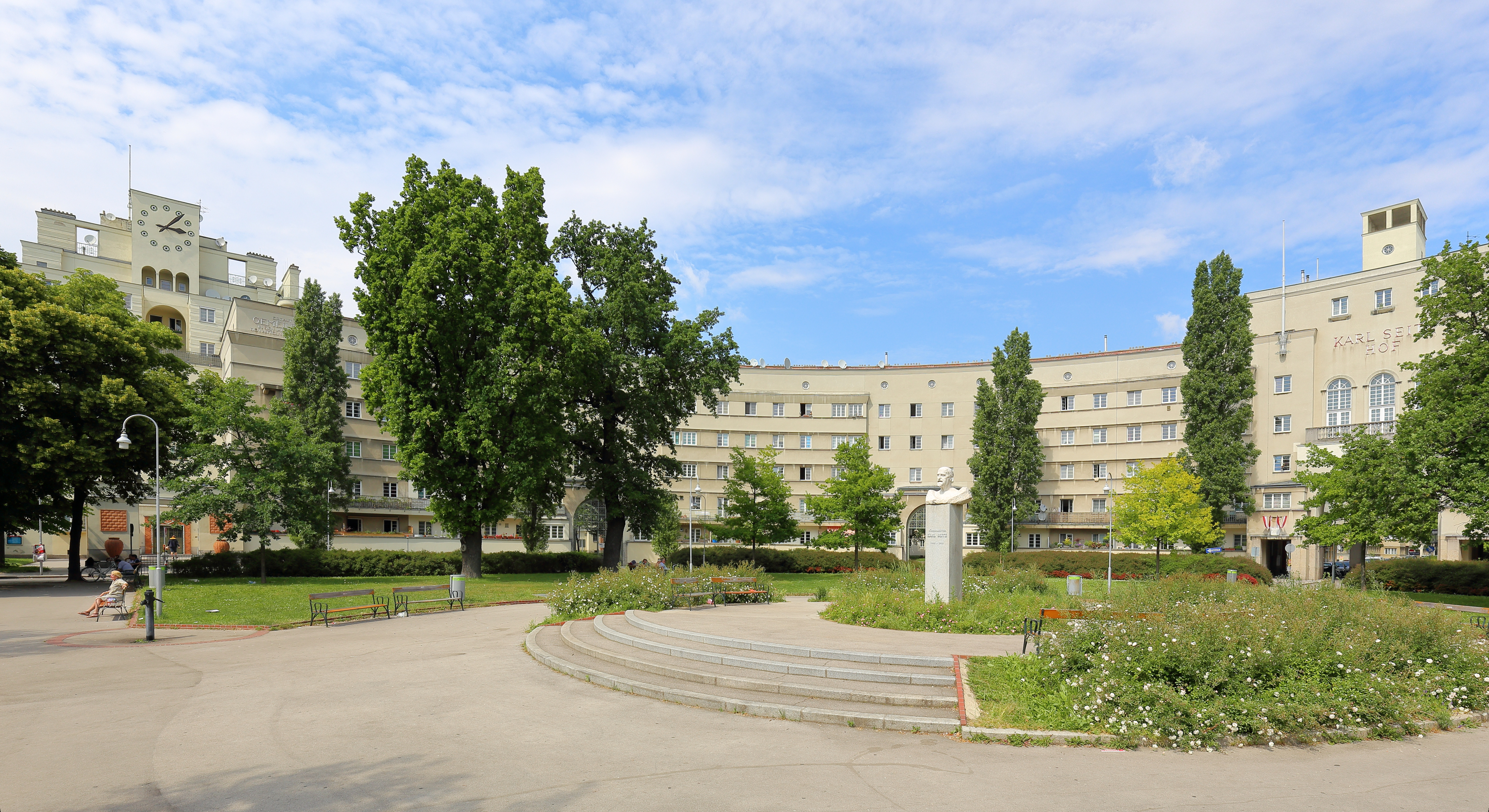 Zentrum des Karl-Seitz-Hofes im 21. Wiener Gemeindebezirk Floridsdorf.Die städtische Wohnhausanlage (Gemeindebau) mit rd. 1.150 Wohnungen wurde von 1926 bis 1933 nach Plänen von Hubert Gessner errichtet und am 16. Juni 1951 nach dem sozialdemokratischen Politiker Karl Seitz benannt. Im Vordergrund die platzartige Verkehrs- und Grünfläche beim Zentrum der Wohnhausanlage, die am 10. Februar 1998 nach Gemeinderatsausschuss für Kultur Karl-Seitz-Platz benannt wurde. Das Seitzdenkmal in der Mitte des Vorplatzes wurde 1951 aufgestellt, die Büste dazu schuf Gustinus Ambrosi.